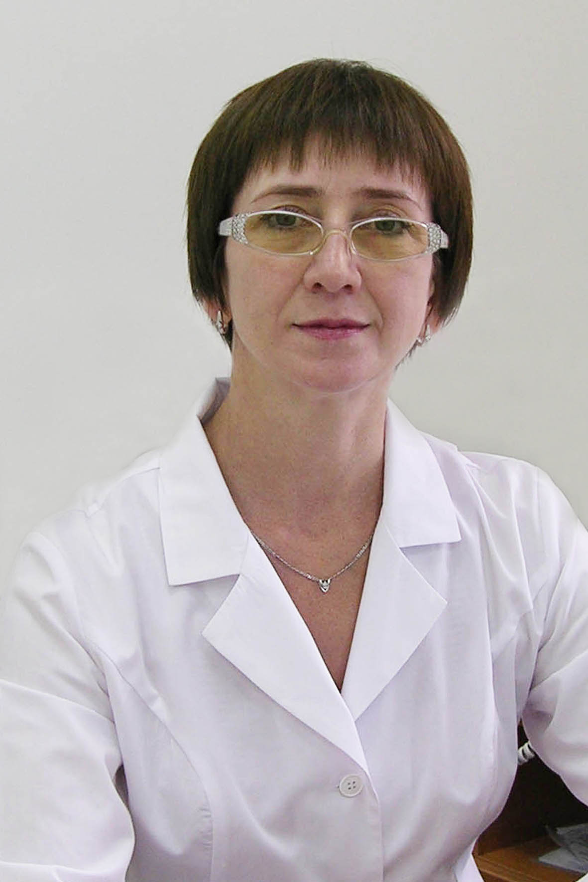 Заместитель главного врача по клинико-экспертной работе в Томском Областном Перинатальном центре